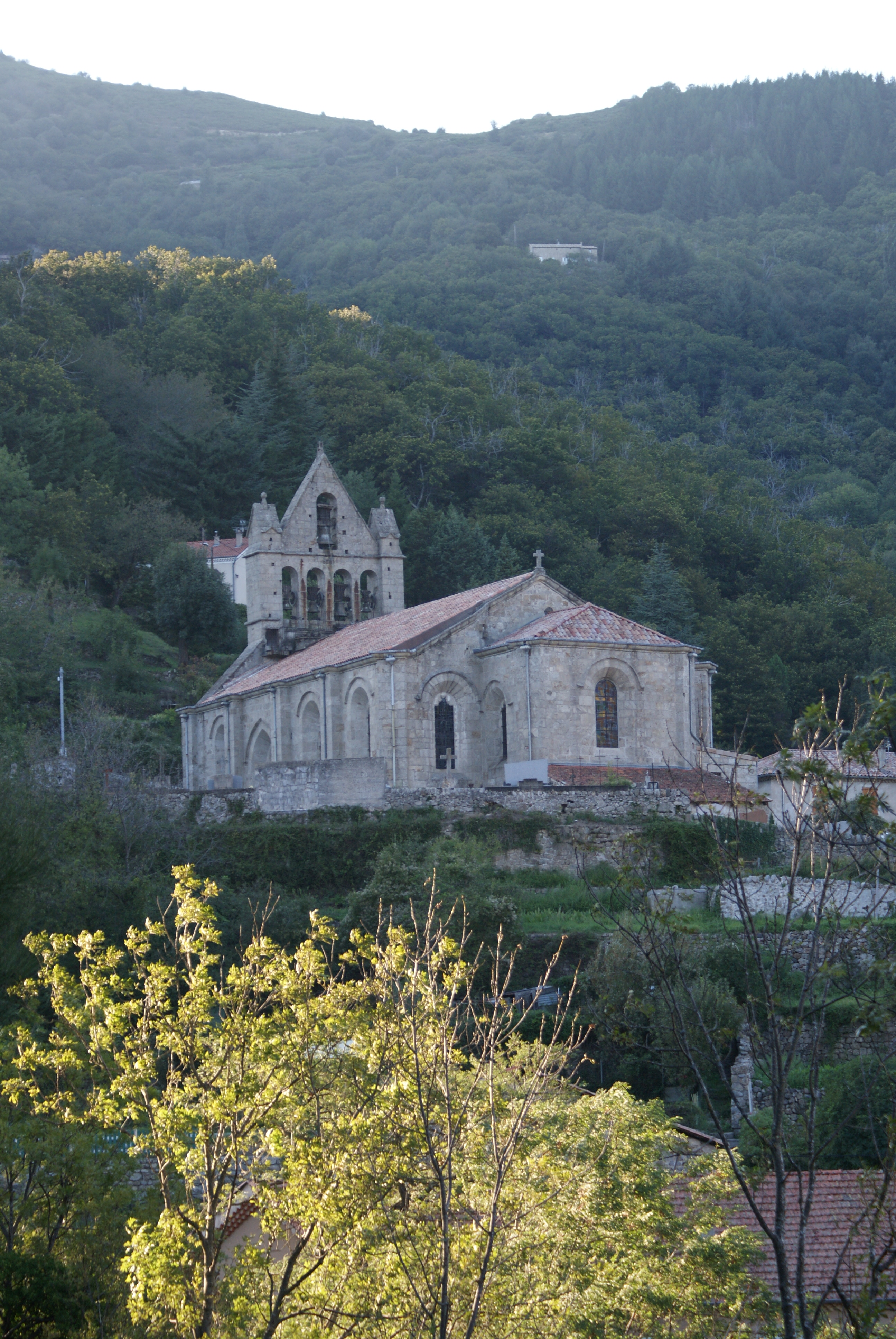 Église Saint-André, (Classé, 1930) .